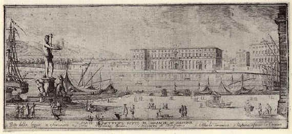 Francesco Sicuro, Fontana del Nettuno, Palazzo Reale (di Andrea Calamech, 1524-1589), e Porta della Loggia a Messina. Incisione del sec. XVII.